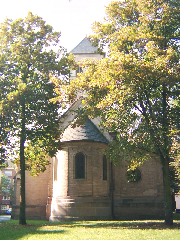 Alt St. Martin, die Alte Bilker Kirche an der Bachstraße Ecke Martinstraße, das älteste in Düsseldorf noch sichtbare Gebäude, hier die Apsis, nach 1200